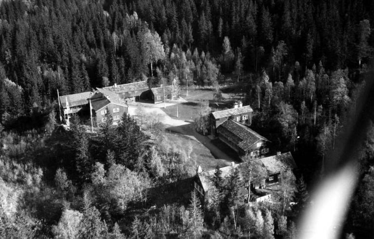 Lysebu sett fra luften, 1949